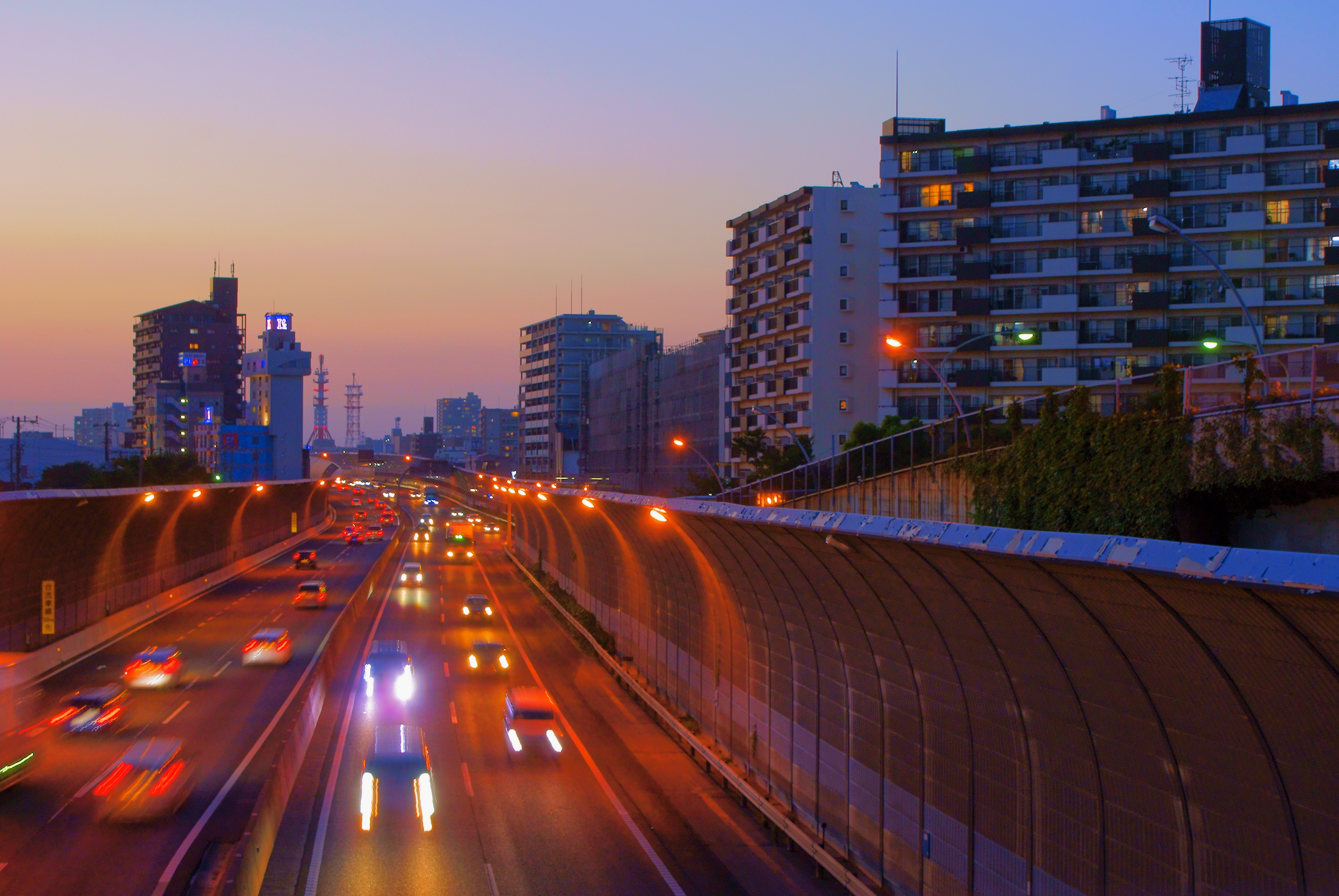 Keiyo Freeway is an important street of the Keiyo industrial complex that 300,000 cars pass per day.